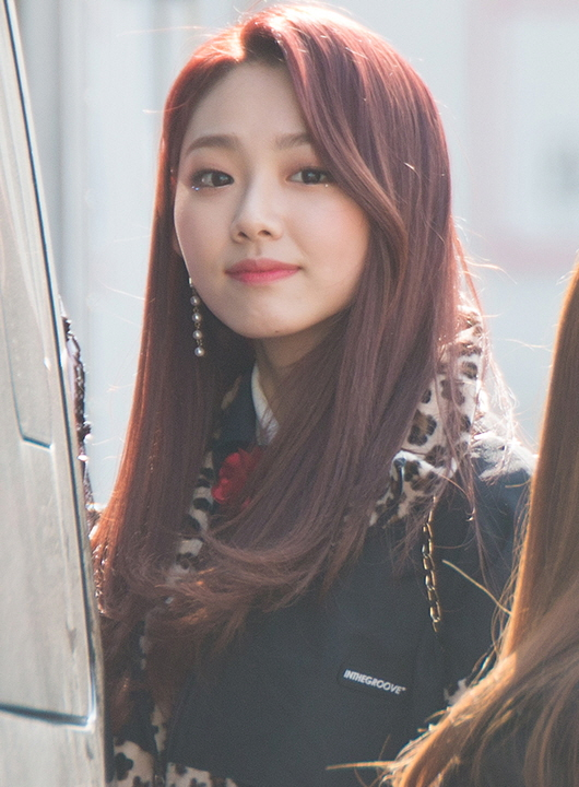 20180311 구구단 인기가요 퇴근길